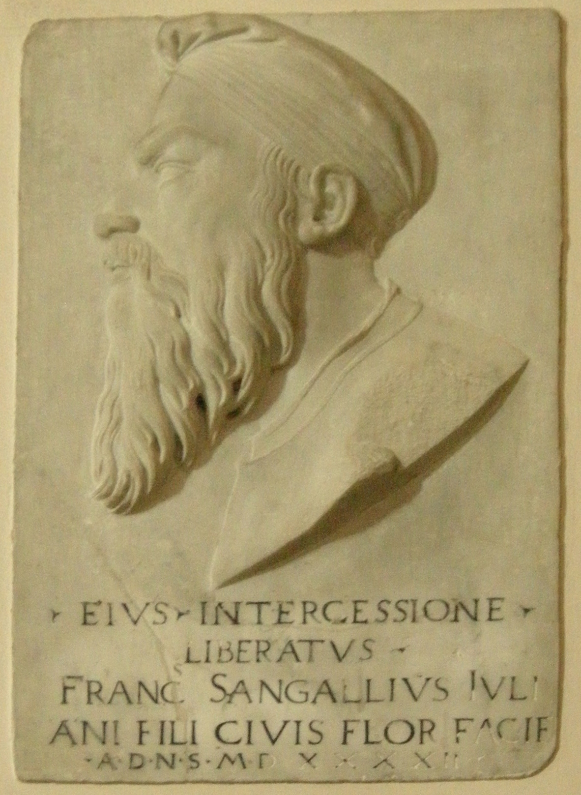 Santa Maria Primerana, interno, autoritratto di francesco da sangallo (1542)